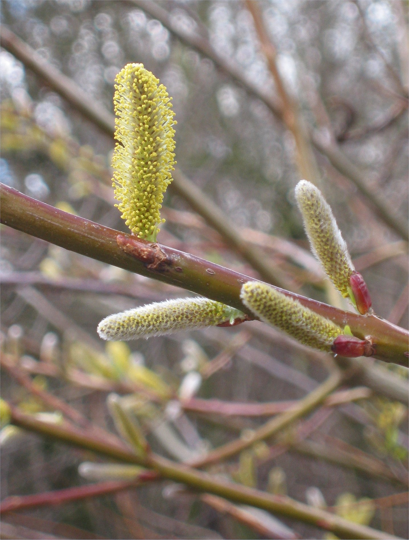 (nl: Bandwilg bloeiwijze) Salix 'Sekka'